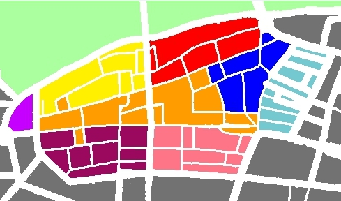 Mapa de la zona antigua de logroño diferenciado según calles y monumentos